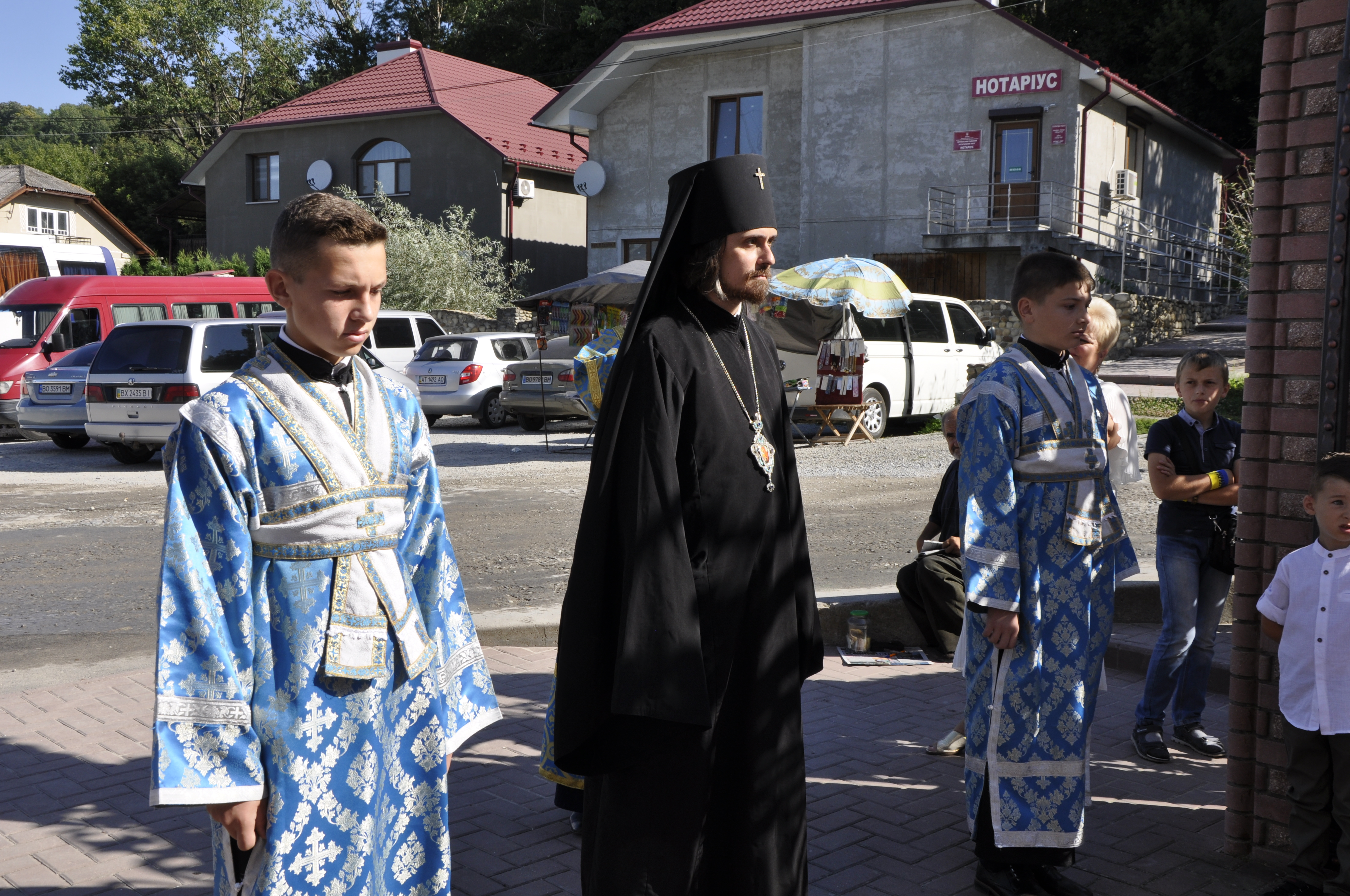 Проща до Чорткова